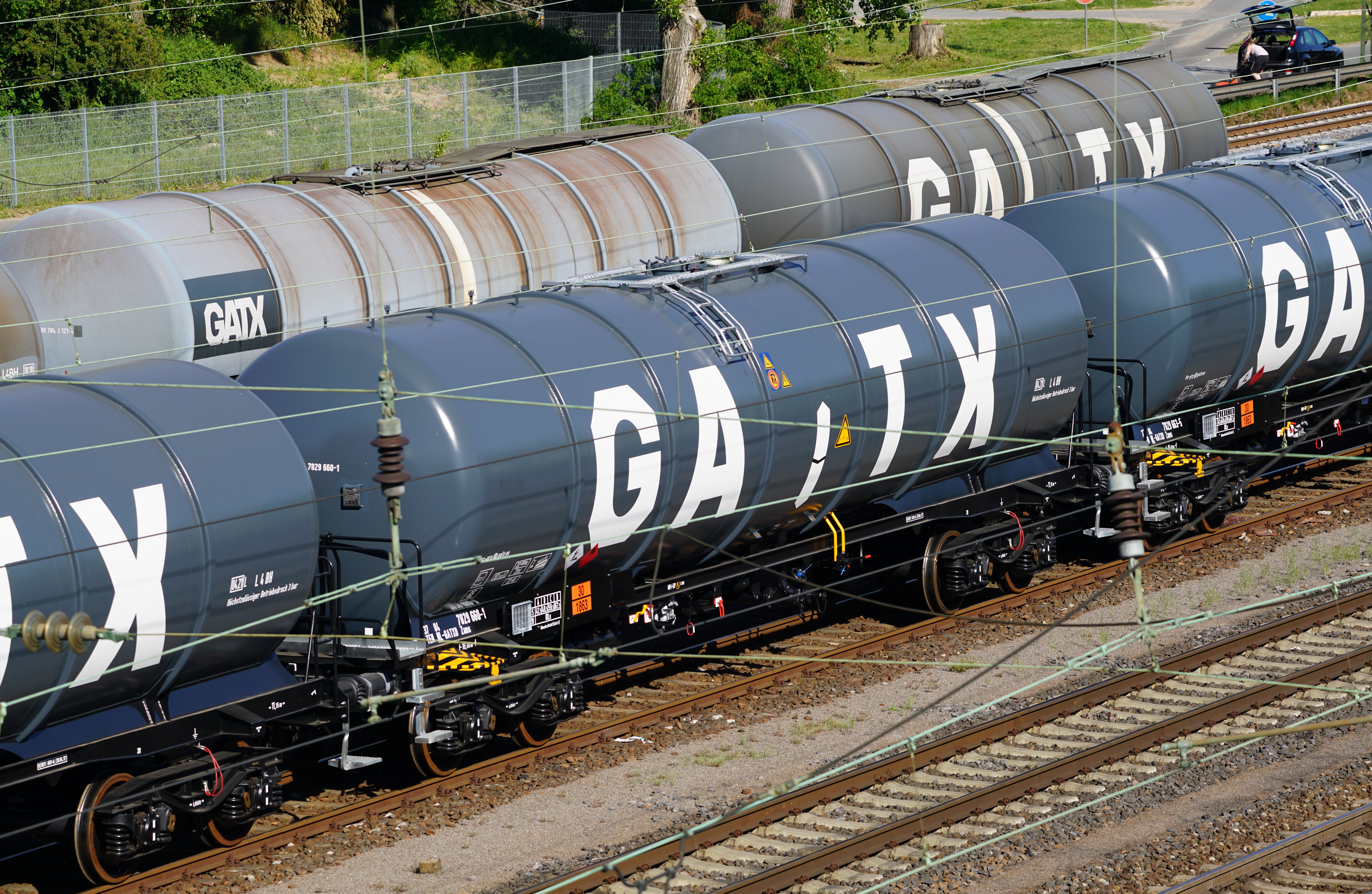 Kesselwagen der General American Transportation Corporation (GATX) im Bahnhof Mainz-Bischofsheim (Bahnhofsteil Ostseite) auf der Gemarkung der Gemeinde Bischofsheim in Hessen. Sie haben die UN-Nummer 1863 und die Bezeichnung „Düsenkraftstoff“ (Jet A-1). In diesen Kesselwagen wird Kerosin transportiert.